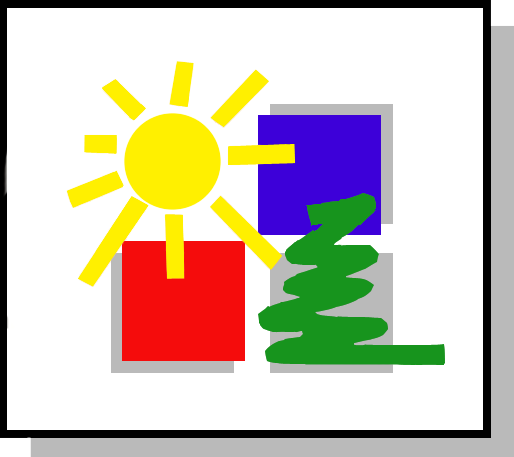 Es un logo visual y formalmente fuerte, de fácil reconocimiento y de sencilla reproducción en cualquier soporte que representa la vida en Curuzú.